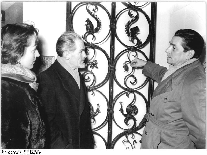 Berlin, Ausstellung Fritz Kühn Zentralbild Zühlsdorf We-Th 1.3.1956 Ausstellung des Kunstschmiedes Fritz Kühn. Am 1.3.1956 wurde im Märkischen Museum in Berlin eine Ausstellung des Kunstschmiedes, Nationalpreisträger Fritz Kühn, eröffnet. In dieser Ausstellung werden die besten Arbeiten des Nationalpreisträgers gezeigt. UBz: Nationalpreisträger Fritz Kühn (rechts) im Fachgespräch mit Prof. Werner Laux, Hauptabteilungleiter im Ministerium f. Kultur und Frau Franka Iwibor, von der Abteilung Kultur des Magistrats von Groß Berlin. Abgebildete Personen: Kühn, Fritz Prof.: Kunstschmied, Fotograf, DDR Laux, Werner Prof.: Leiter der Kunsthochschule Berlin, DDR